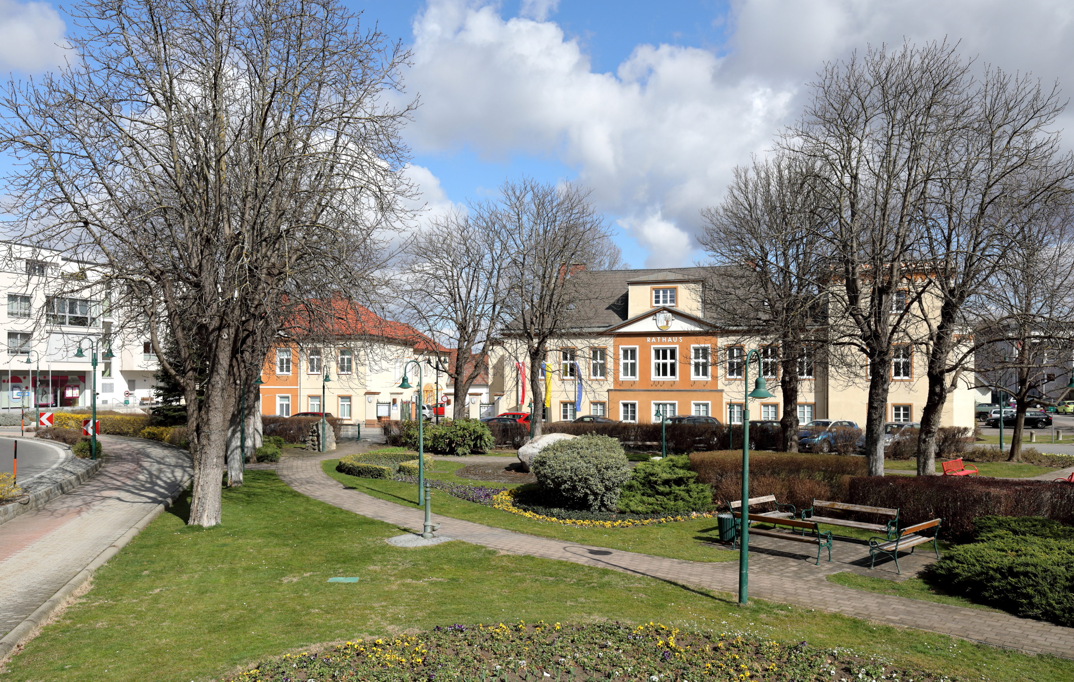 Park und Rathaus am Hauptplatz der niederösterreichischen Marktgemeinde Sollenau.